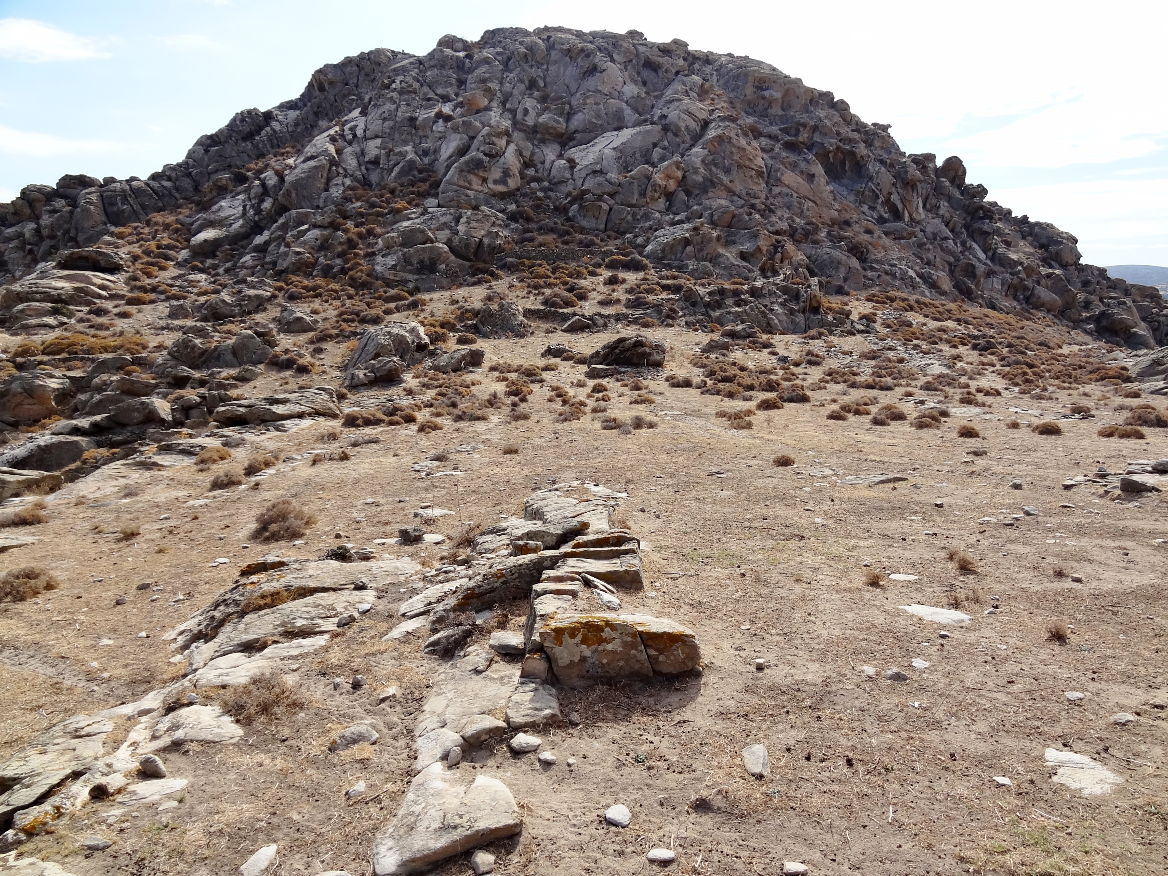 Mykenischen Akropolis von Koukounaries bei Naousa auf Paros, Kykladen, Griechenland